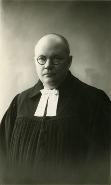 August Eduard Ein, eesti vaimulik